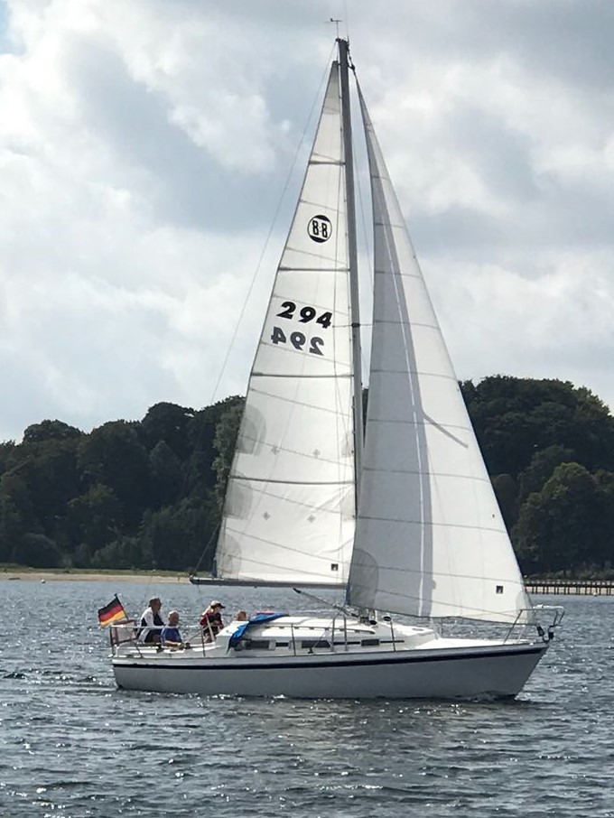 Segelyacht Typ Ohlson 8:8, Konstrukteur: Einar Ohlson (Schweden), Kielboot